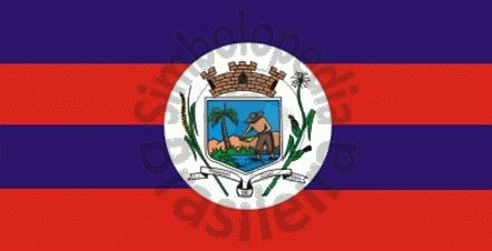 bandeira da cidade palmeiras de goias